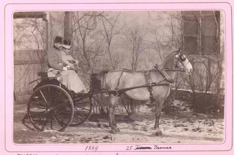 Rudolf trónörökös utolsó képeinek egyike, bakon ülve a Práterben